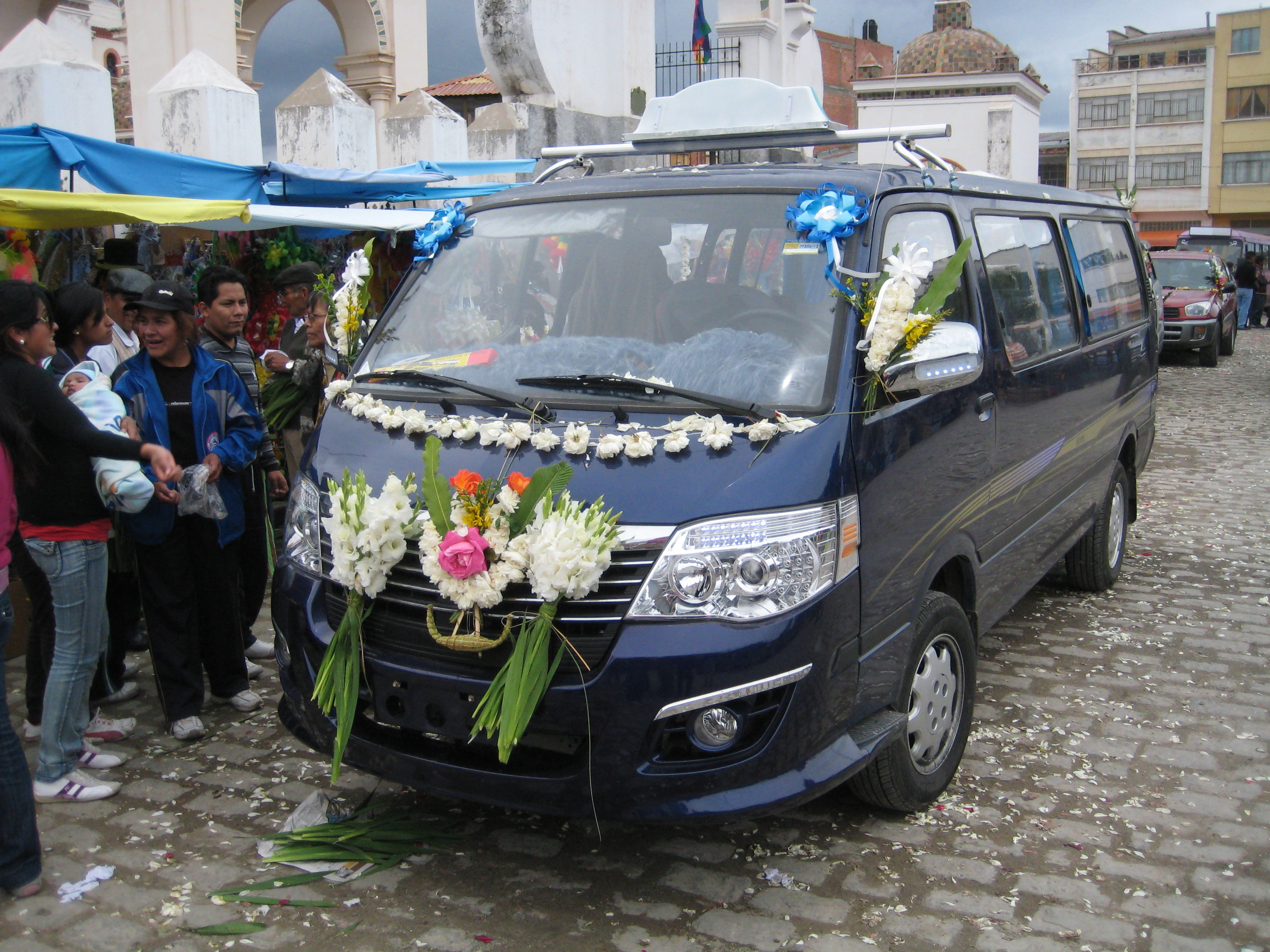 Segnen von Kraftfahrzeugen